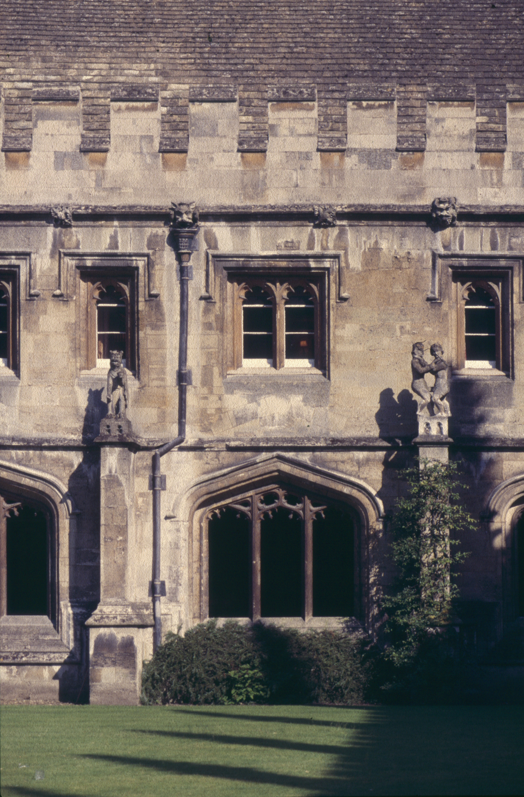 1985 in Oxford